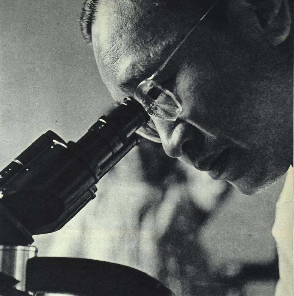 1963-04 1963年 张晓楼